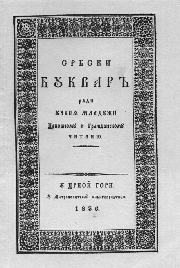 Couverture du bukvar pour le Monténégro de 1836